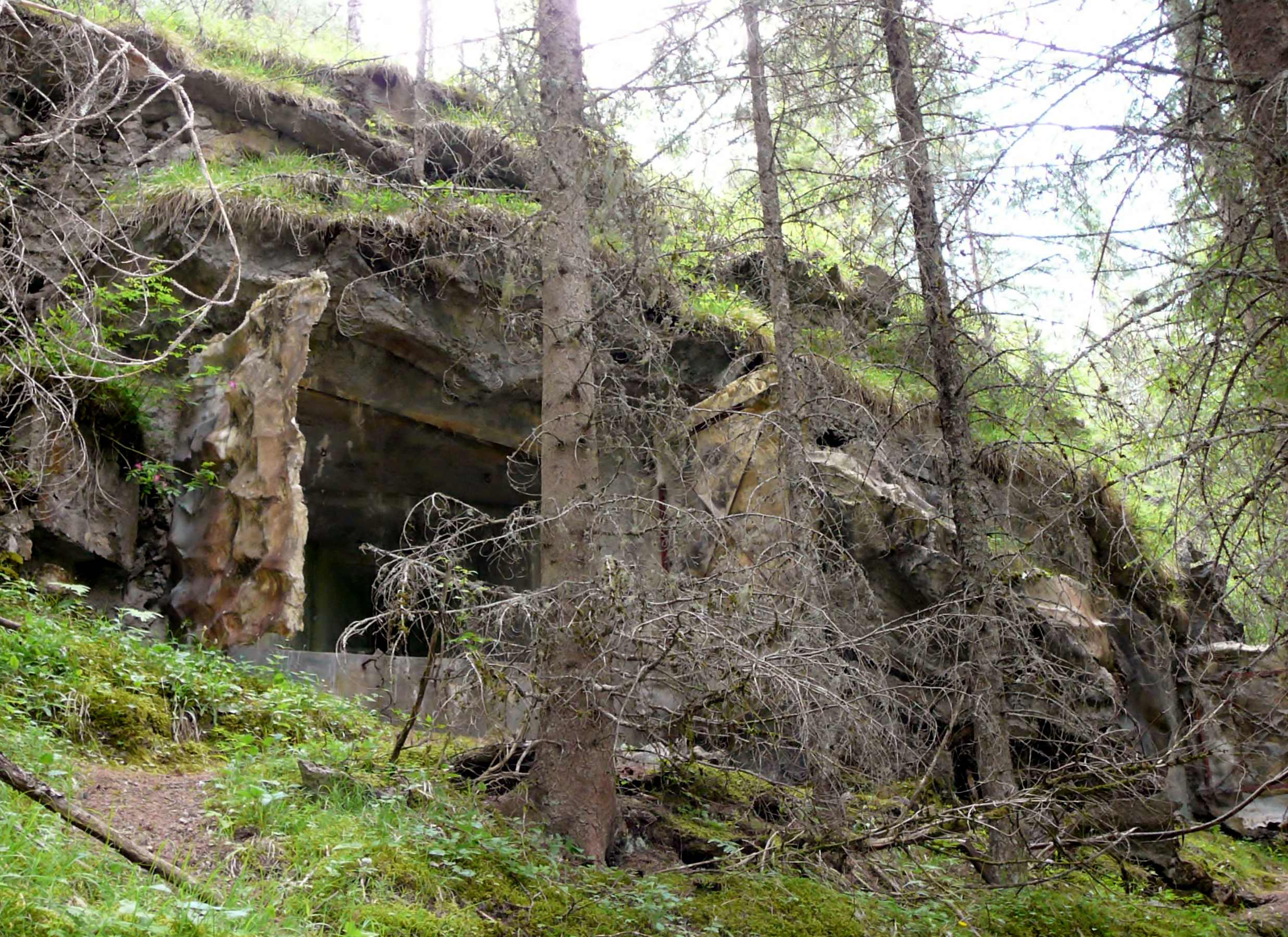 Opera 1 LandroNord